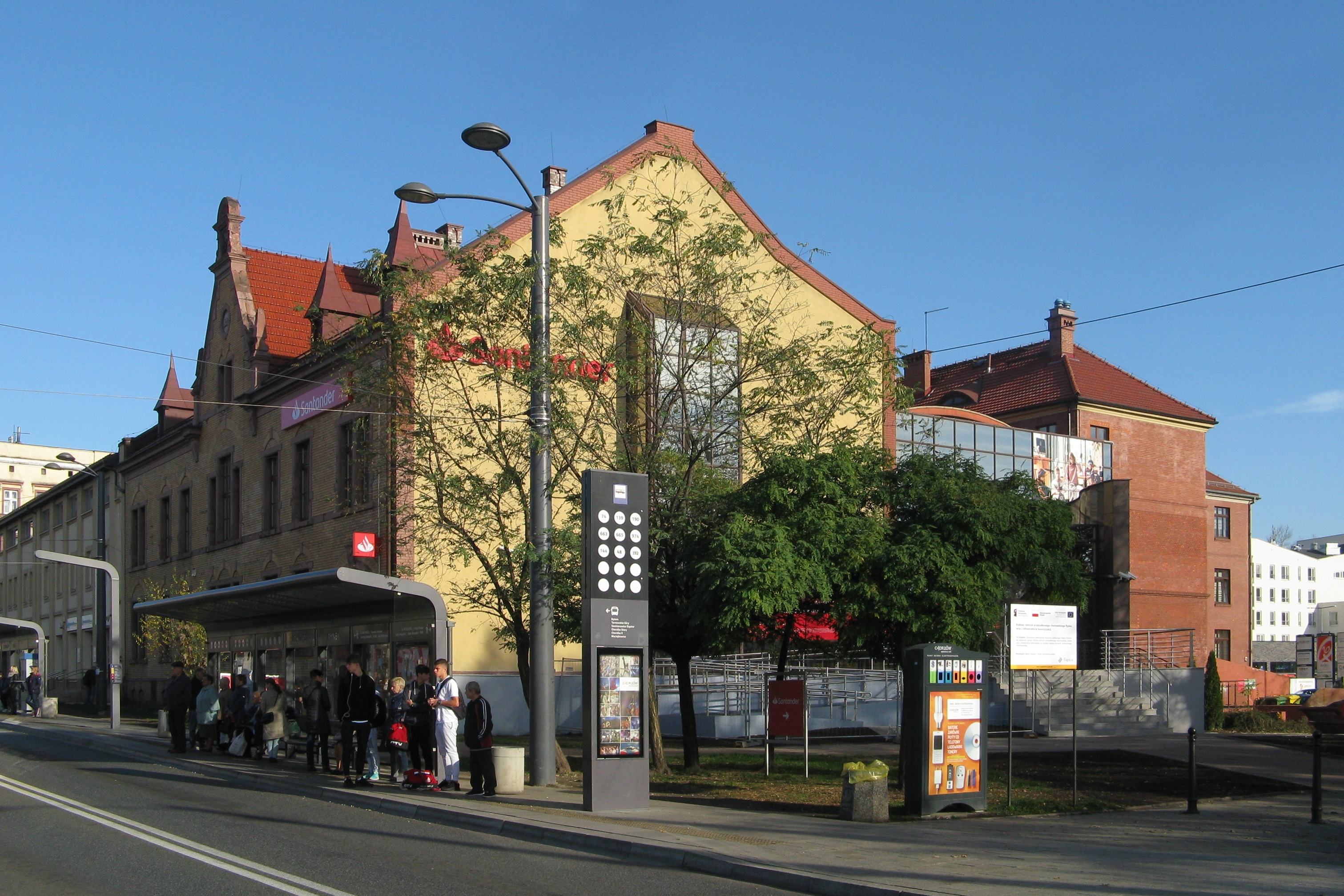 budynek przy ul. Katowickiej 72 w Chorzowie, przy Rynku, wybudowany w 1892 roku